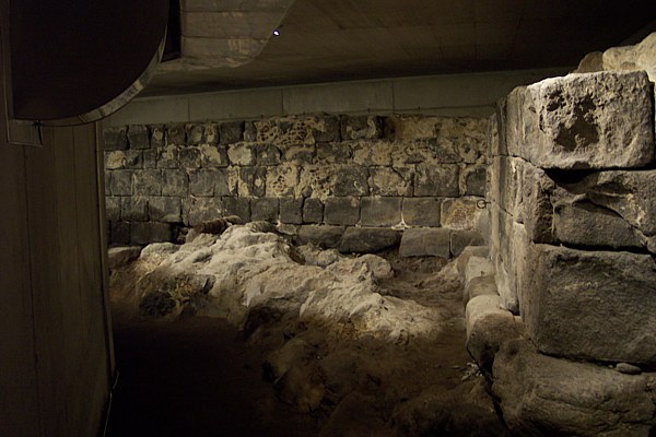 Restos del Castillo de San Cristóbal encontrados durante las obras de la Plaza de España de Santa Cruz de Tenerife (Tenerife, España).